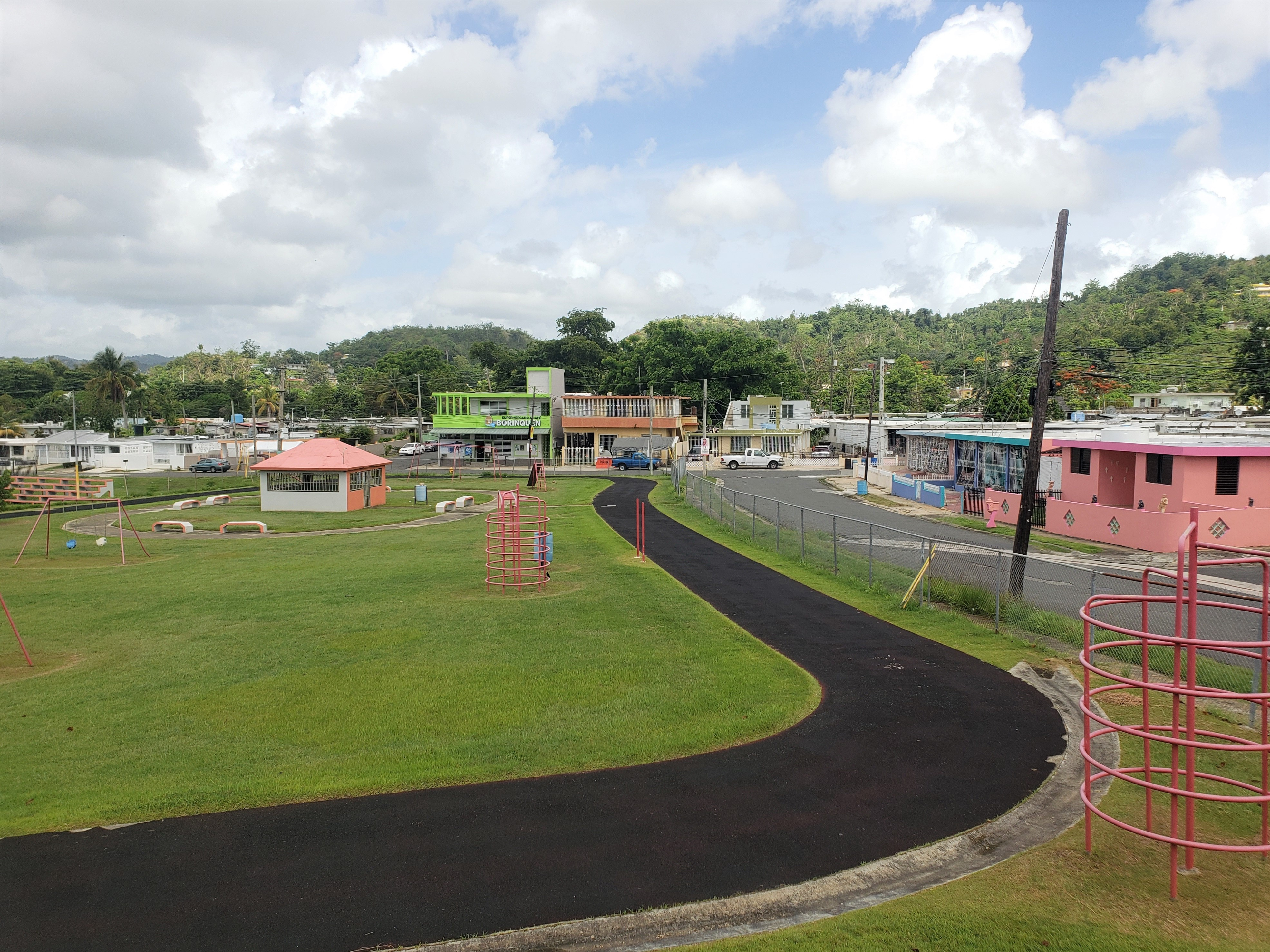 Parque Urb. Los Rosales en Barrio Mabú, Humacao, Puerto Rico